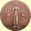 Anežka Habsburská (1392)